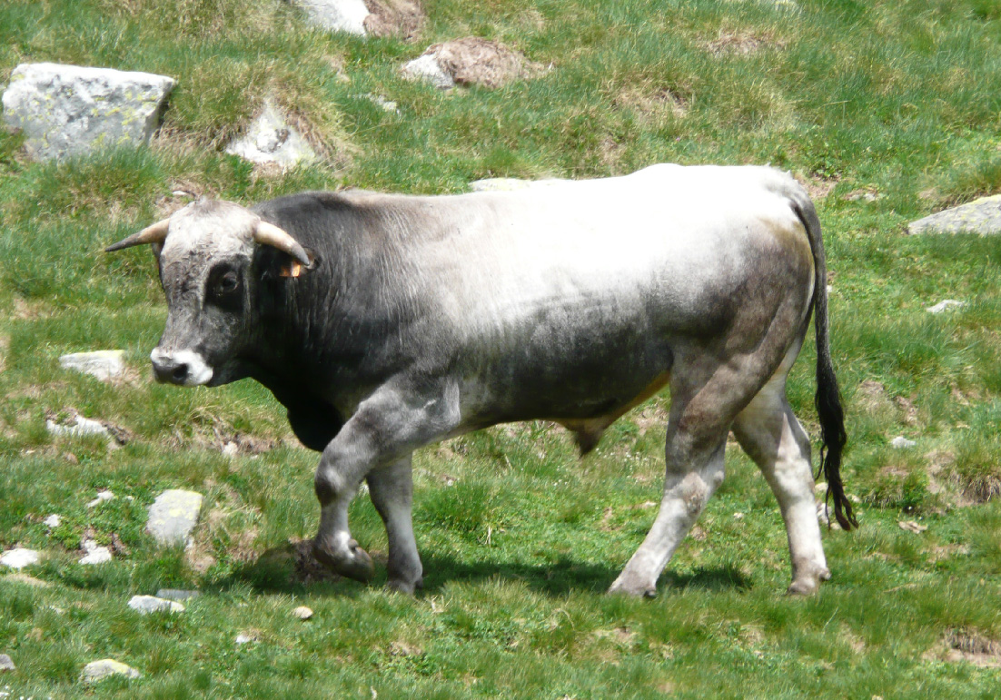 Taureau de race gasconne